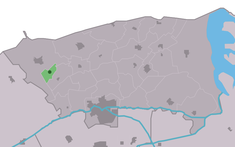 Kaartsje fan himrik fan Waaksens